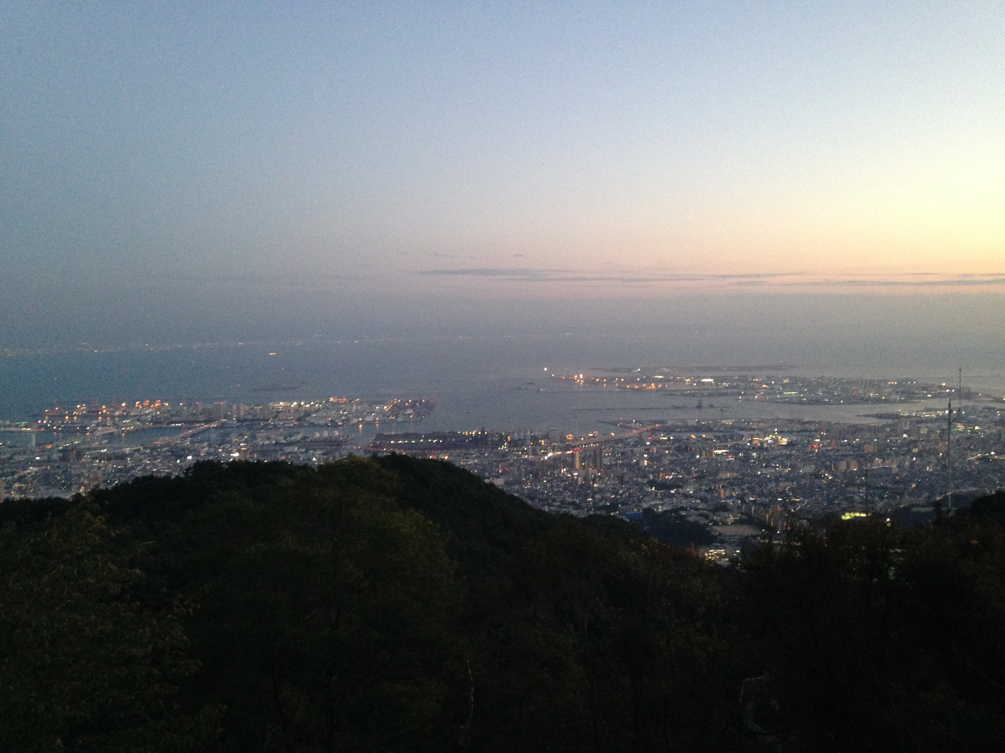 天覧台より望む夕景(六甲アイランド・ポートアイランド方面)